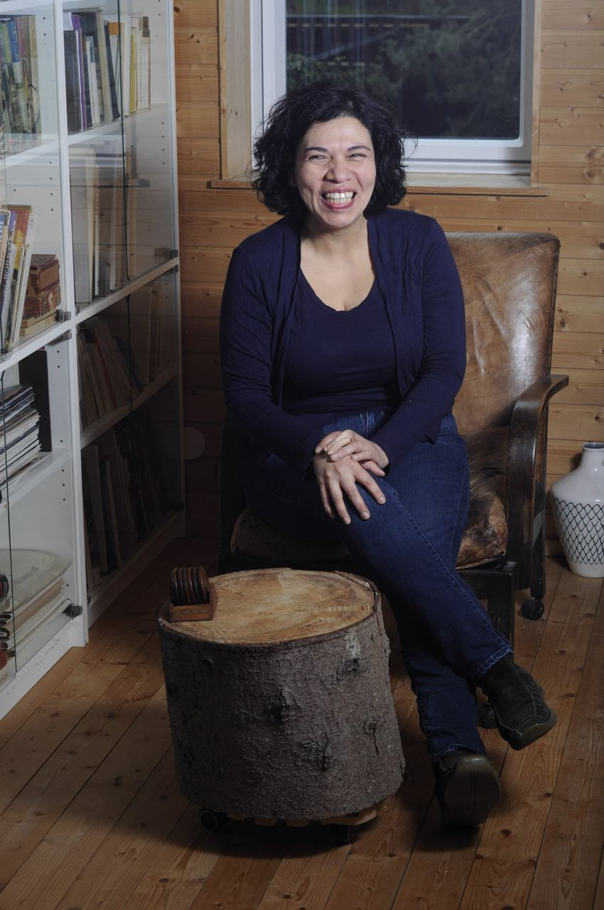 Verónica Ibsel Domínguez - Portrait II